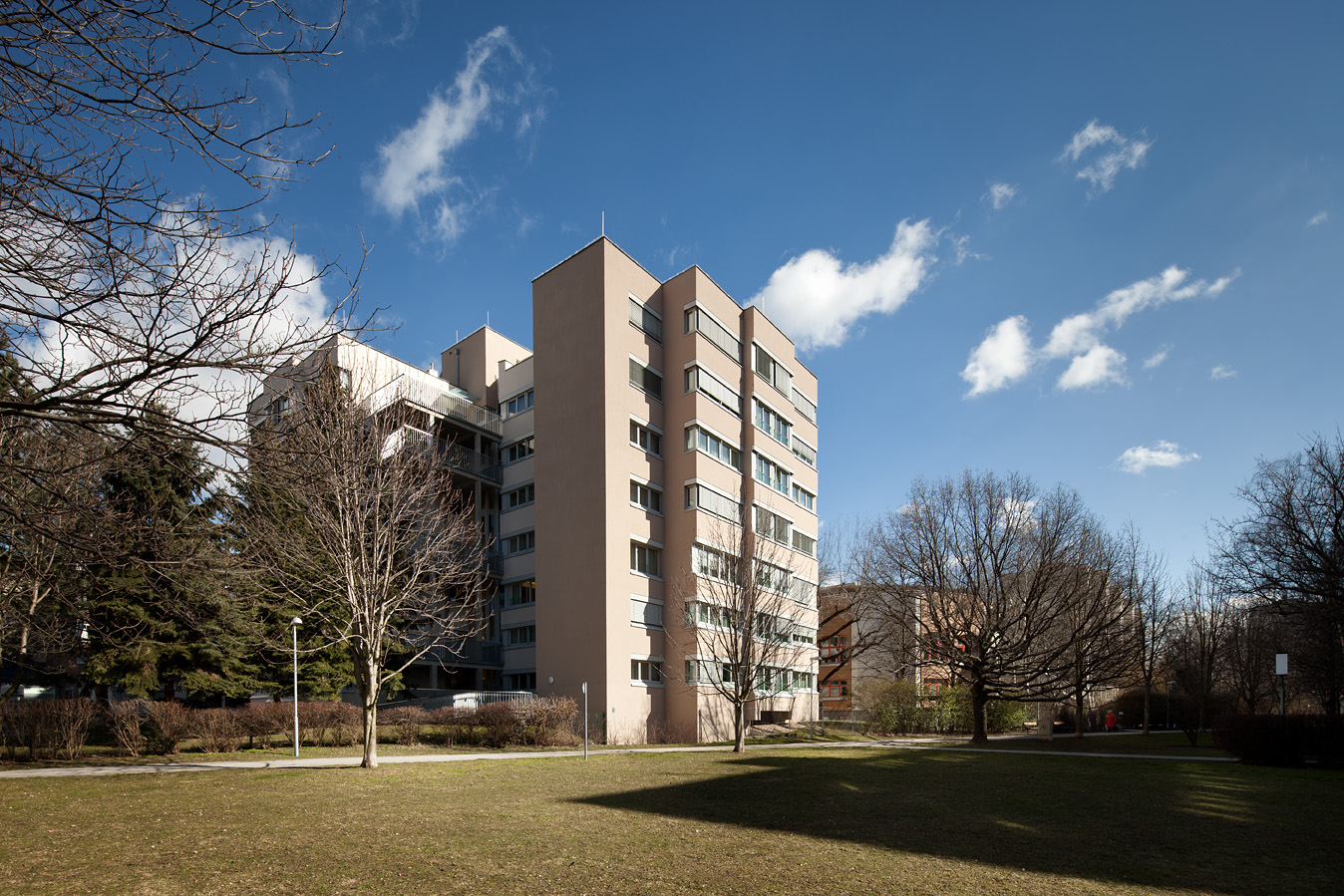 Haus Laaerberg, 1100 Wien